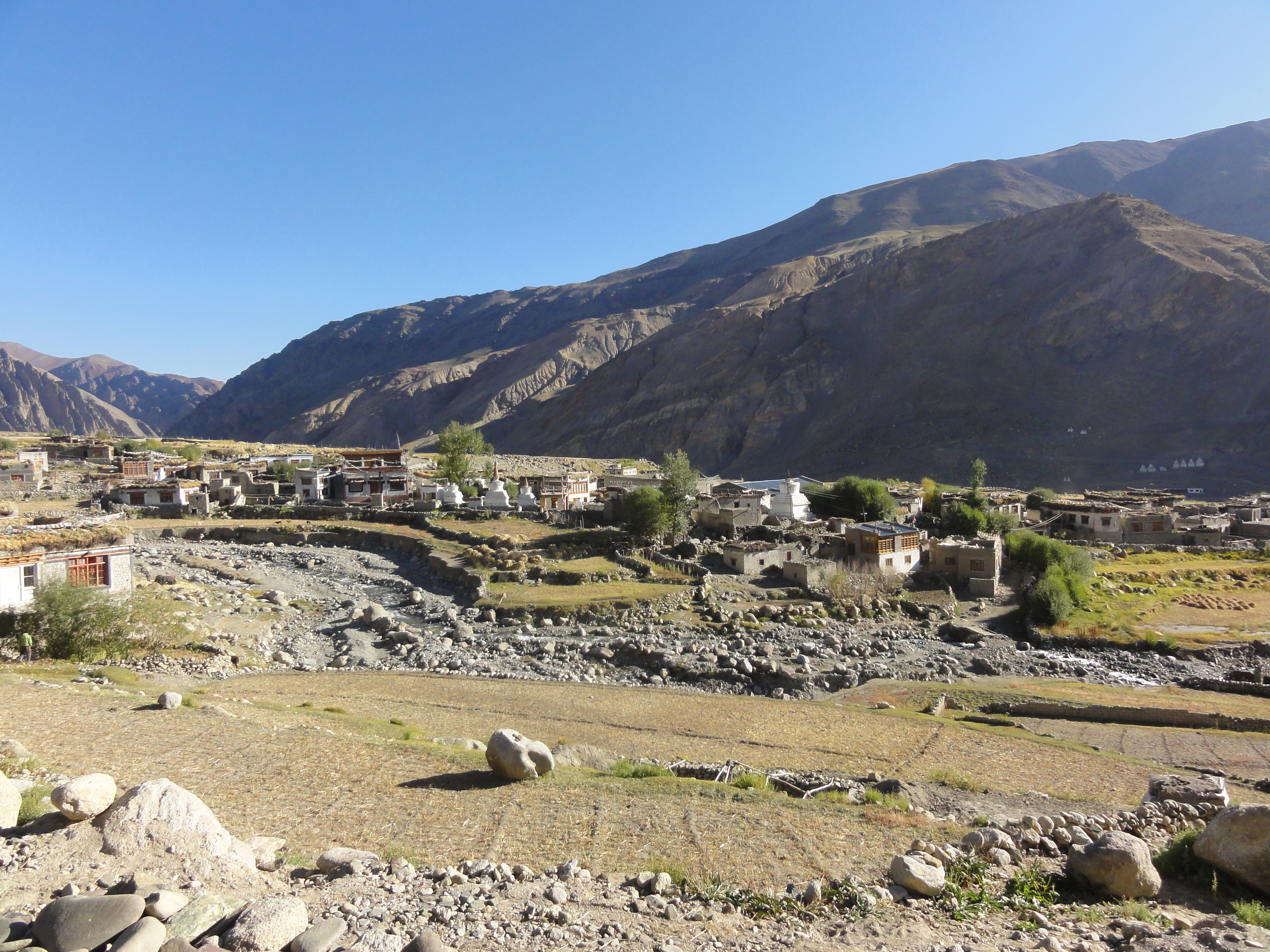 Gya, Ladakh, Indien